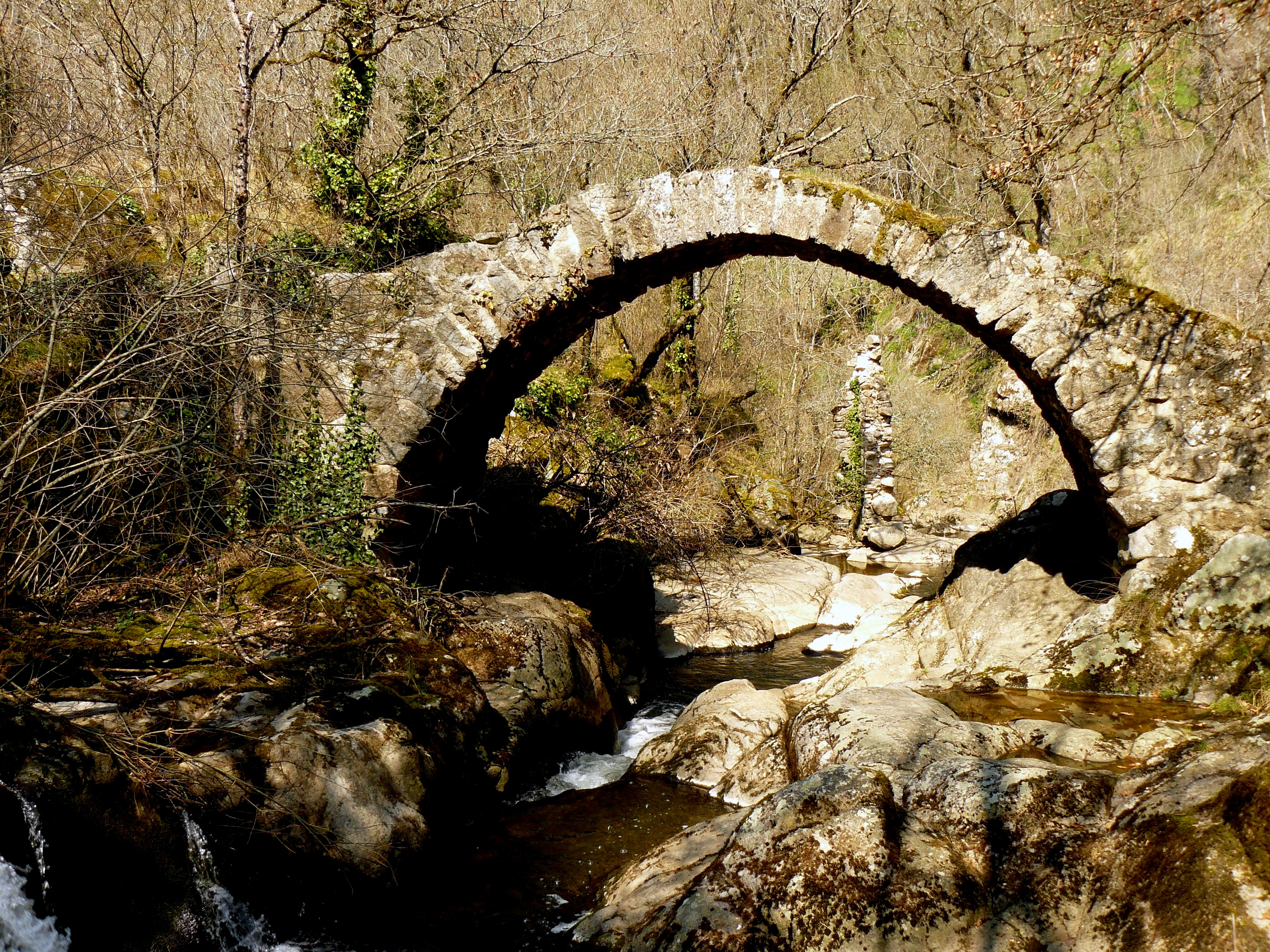 Pont roman du Pareyre (ou Parayre), à Peyrusse-le Roc (Aveyron, France)